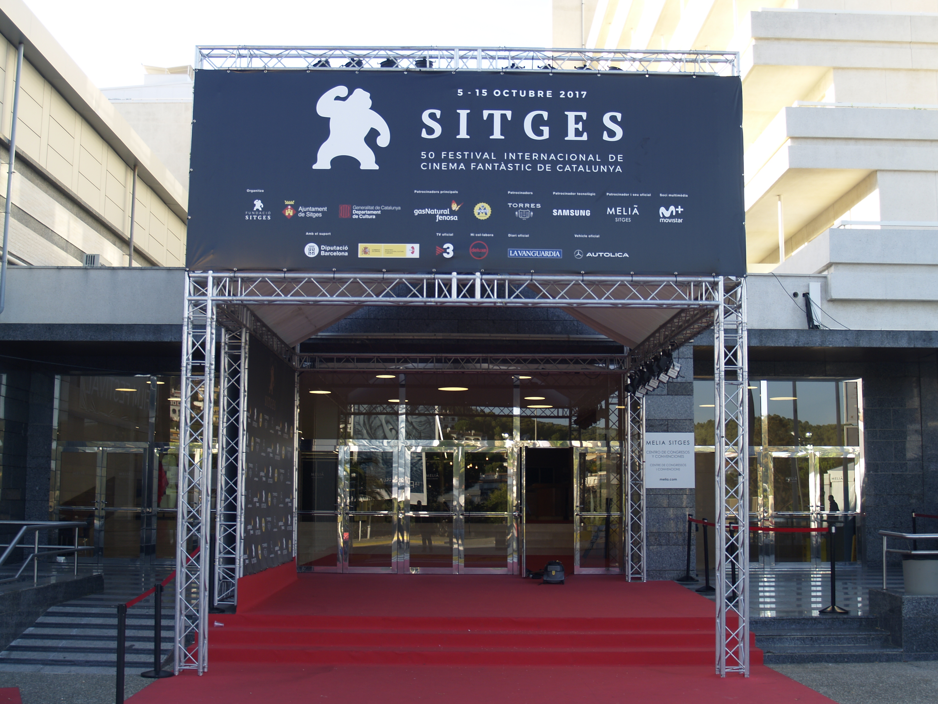 Hotel Meliá Sitges - Festival Internacional de Cinema de Sitges.jpg